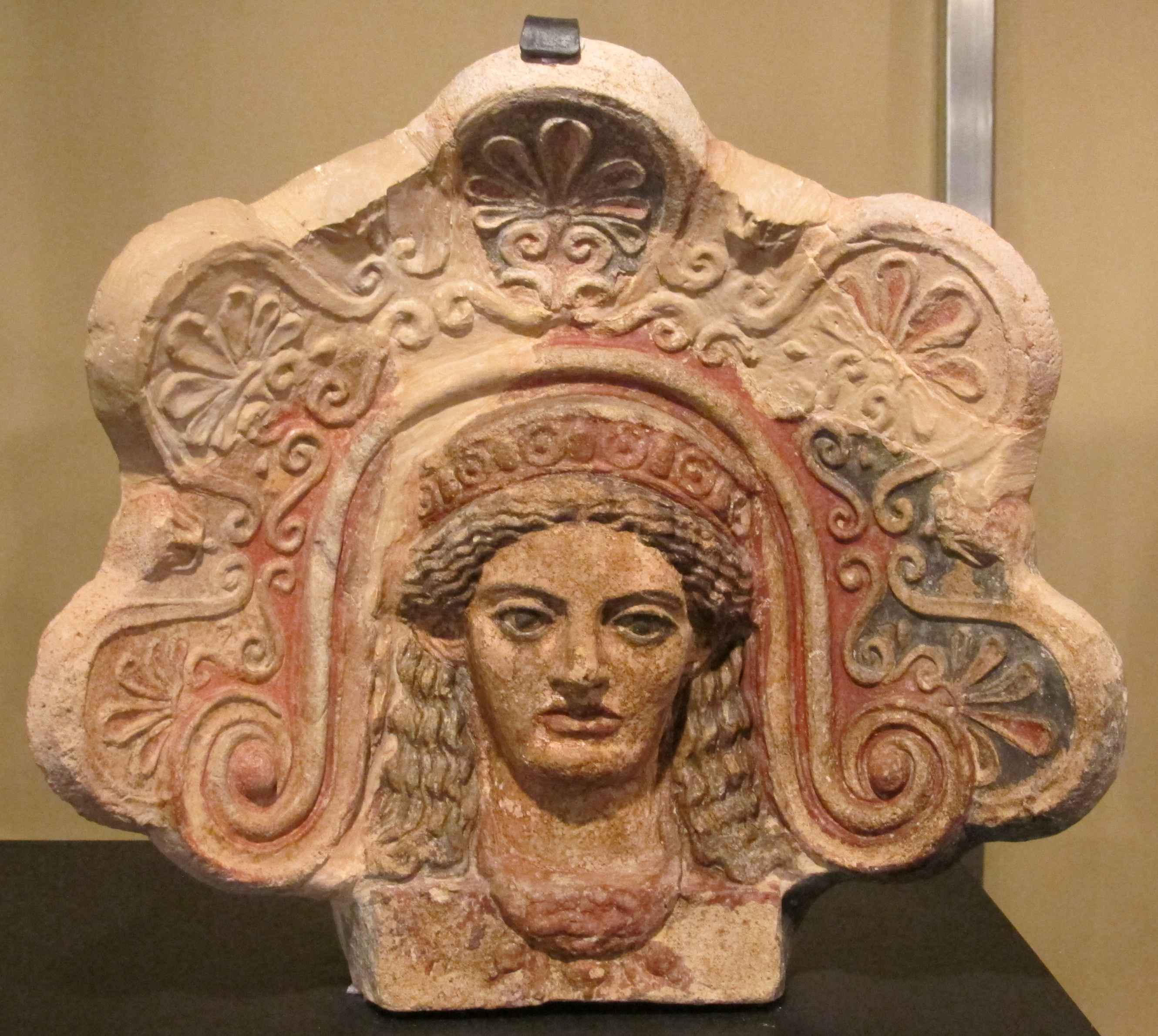 Museo Archeologico Nazionale (Orvieto)